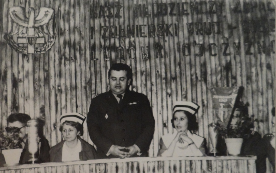 Garnizon stargard Szczeciński, 1970r. Dowódca 45 bm mjr lek. Jerzy Krukowski